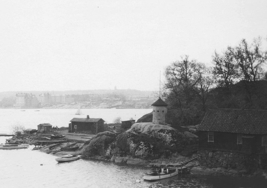 Nya Chartago 1925 på Lilla Essingen. T.h. Färjstugan